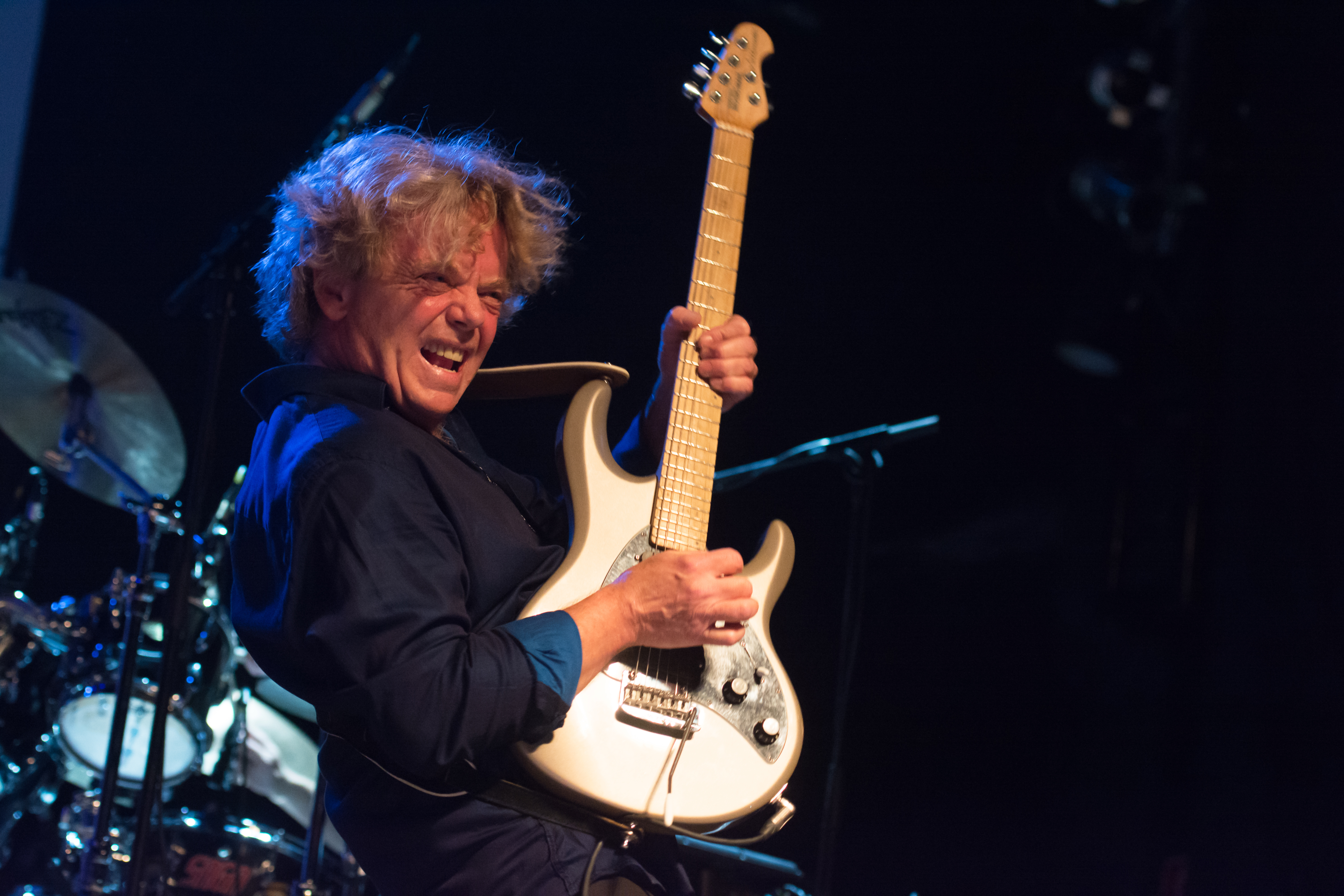 Saga bei der 40th Anniversary - The Final Chapter Tour im Docks Hamburg 2017